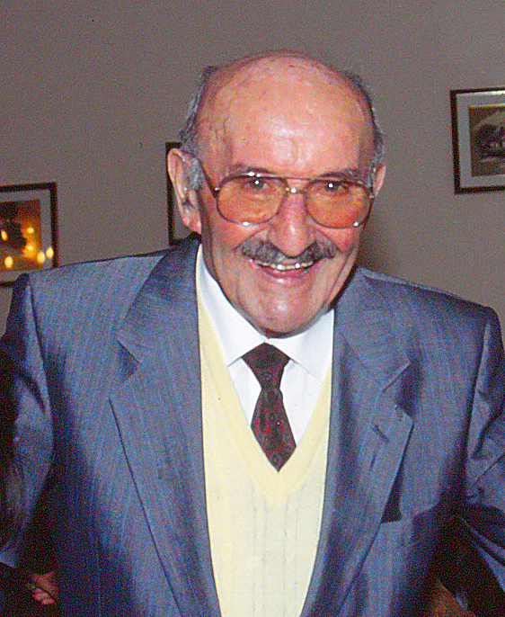 Cesare Pozzi a Valverde